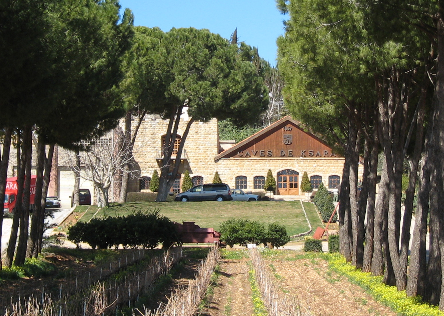 Ksara (Liban), le domaine vinicole.